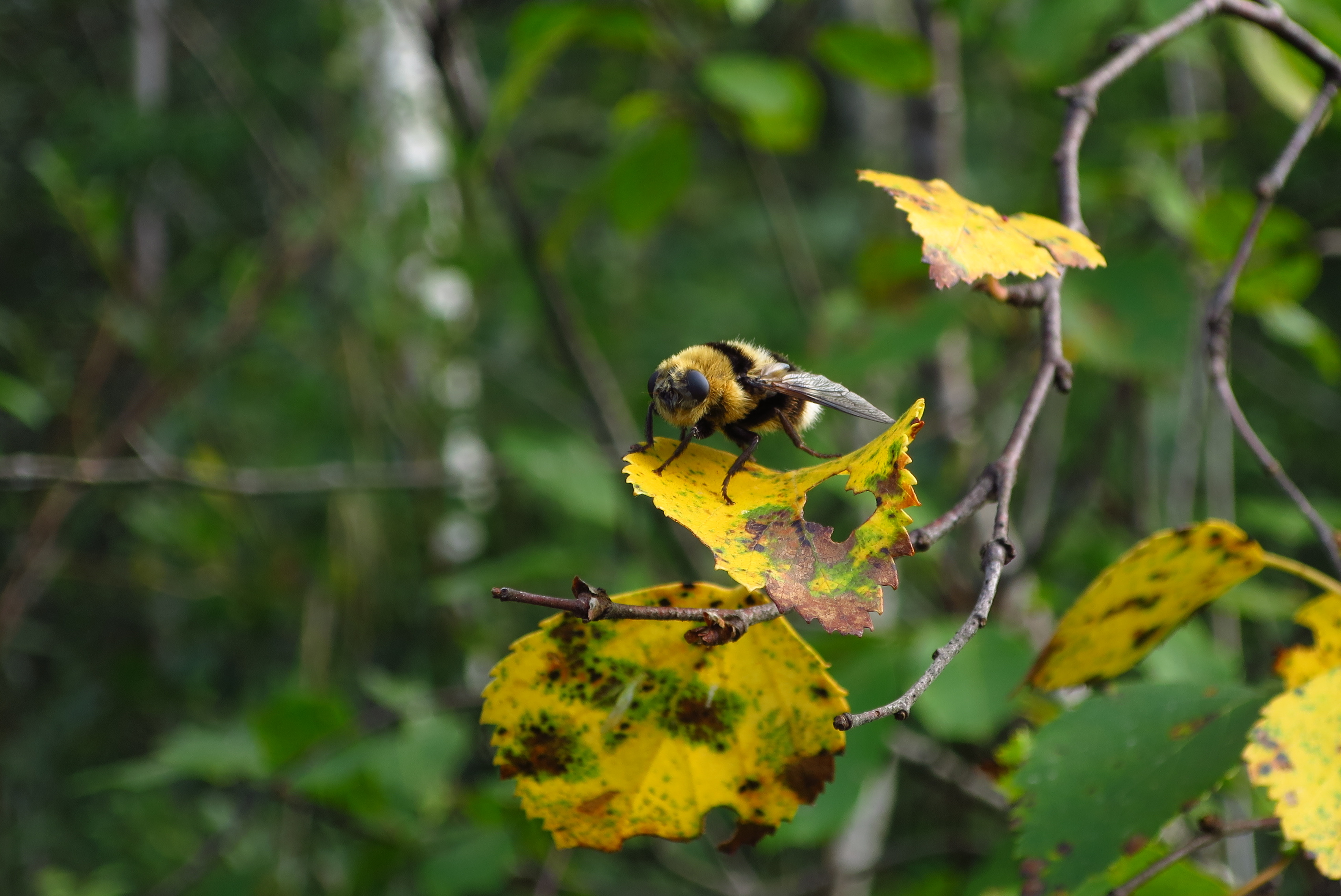 Põdra-ninakiin (Cephenemyia ulrichii) Niibi raba lähistel